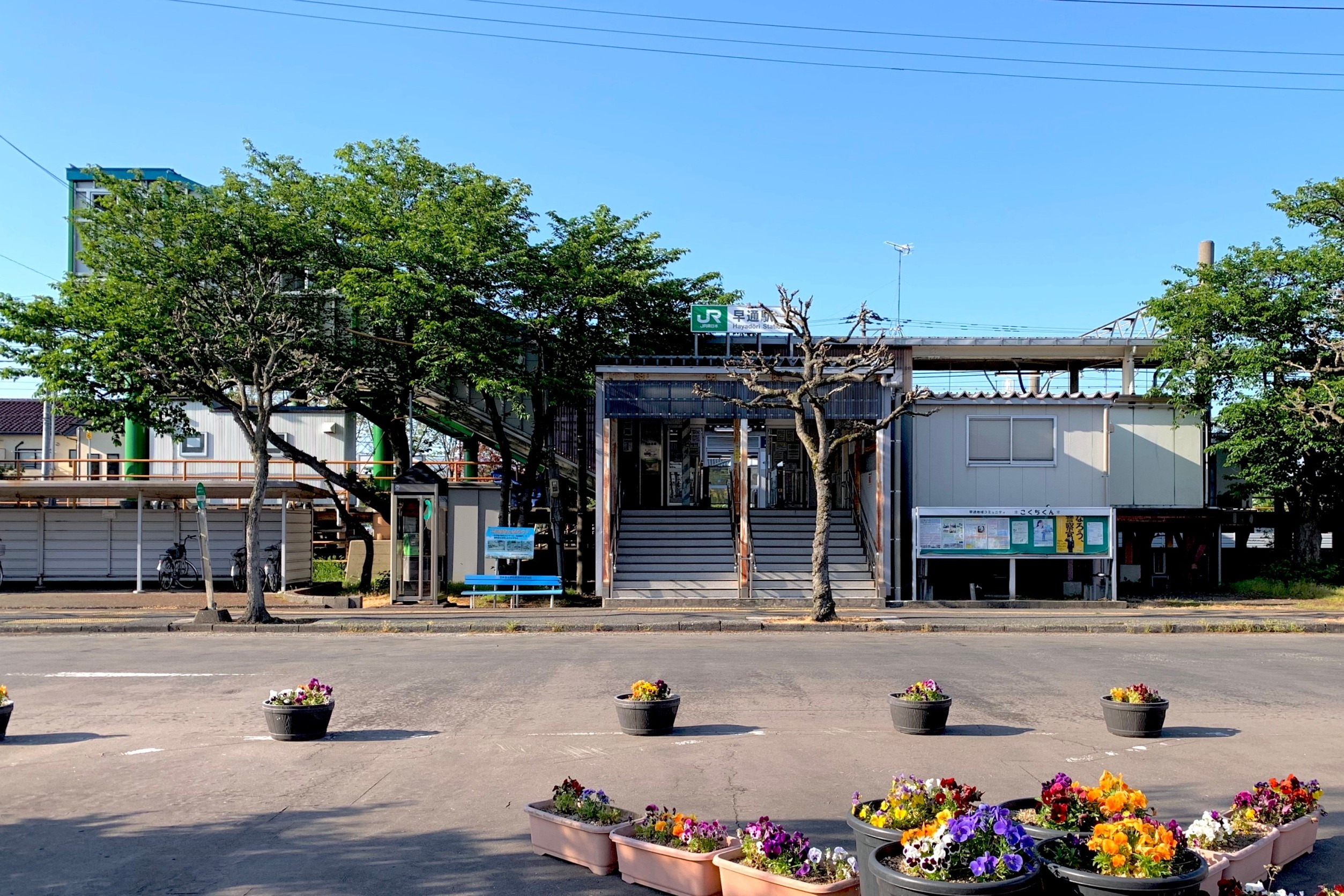 JR白新線早通駅の南口駅舎（2020年5月）